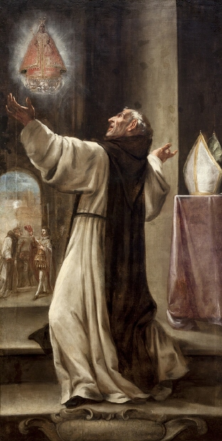 La obra representa a Fray Fernando Yáñez de Figueroa (ca. 1332-1412), uno de los fundadores de la Orden de San Jerónimo.